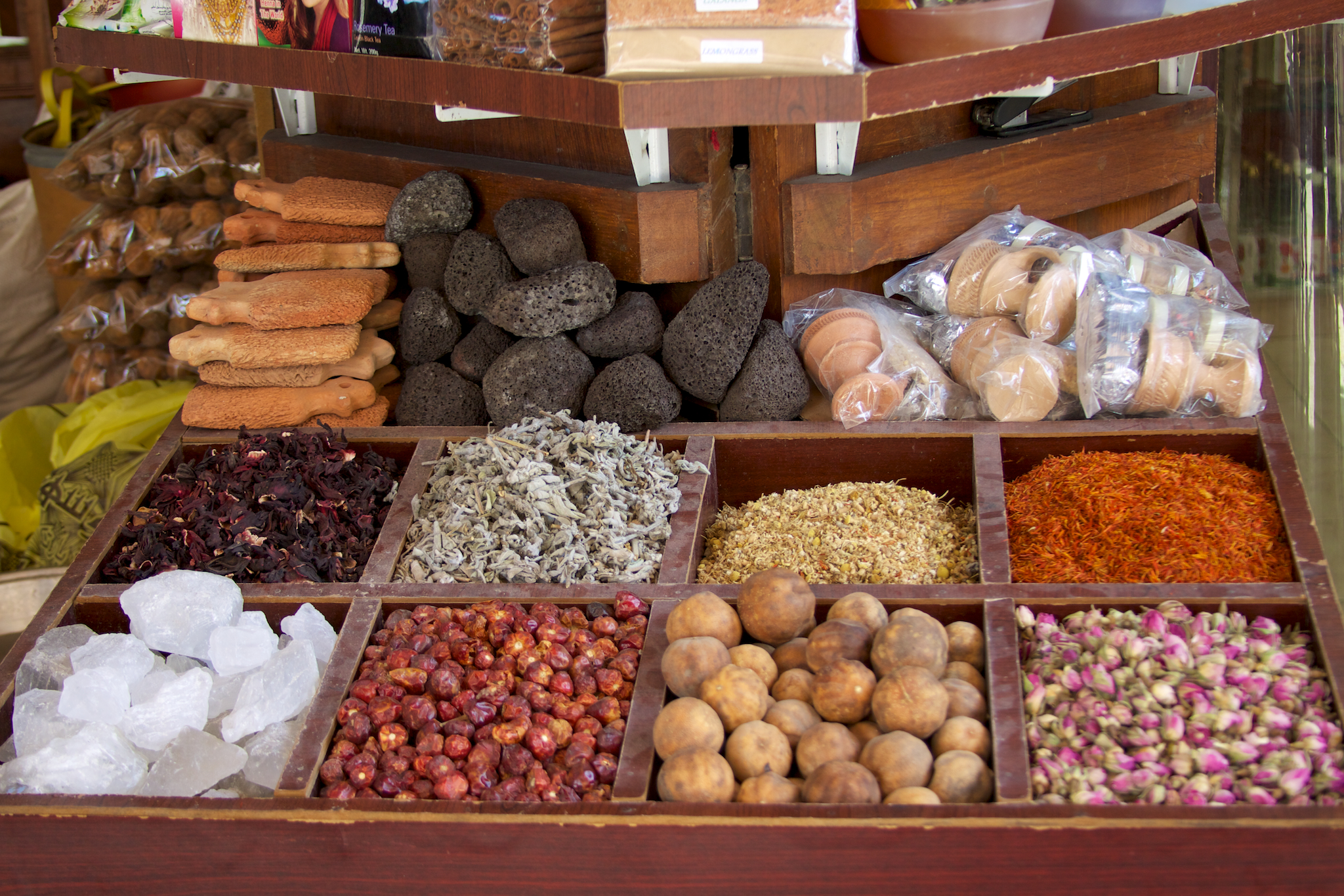 Dubai 10-1002 - 18 - Deira Souks